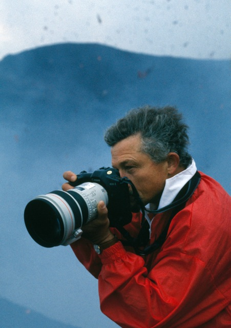 Fotograf Tomáš Míček v akci